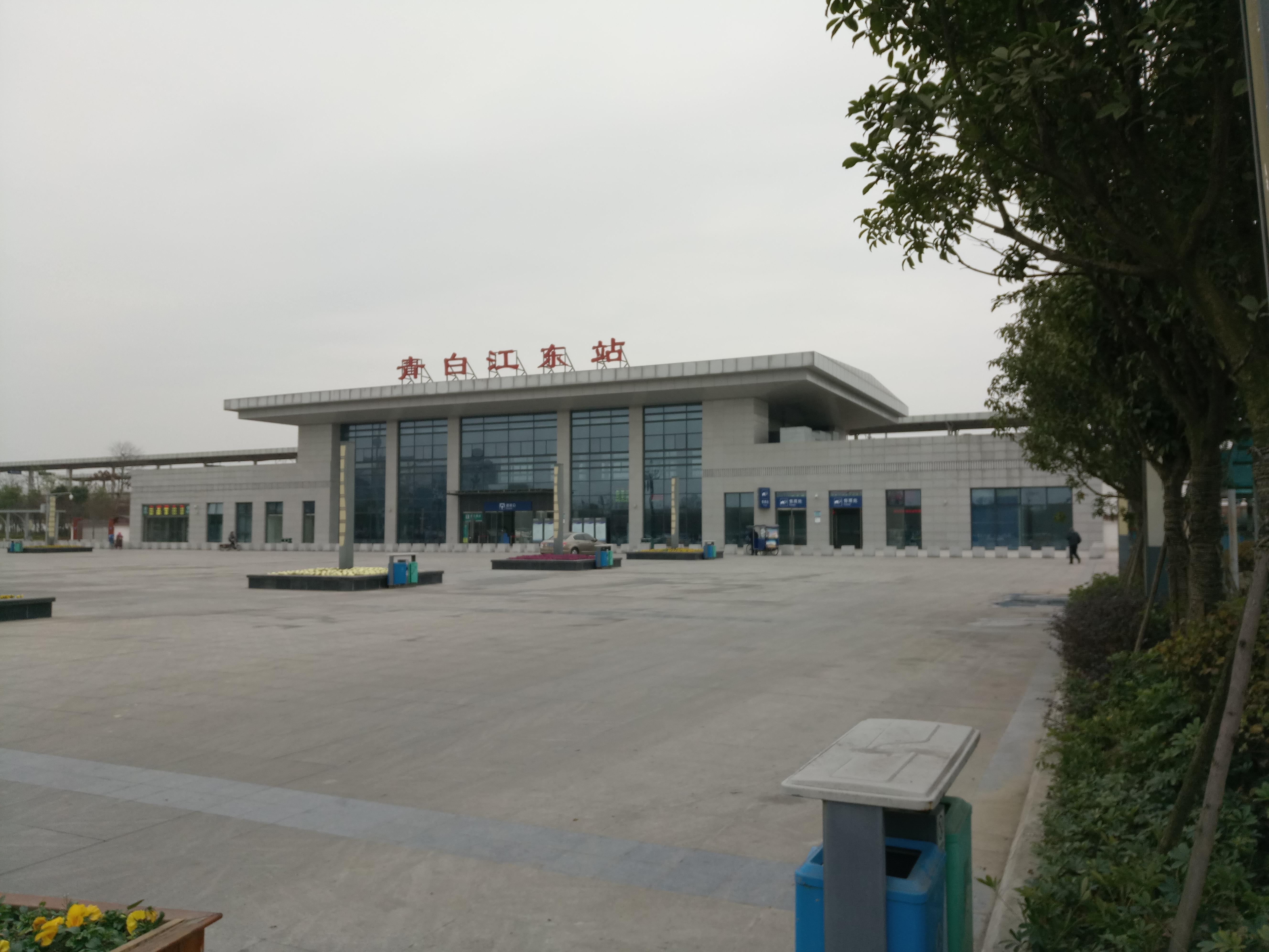 青白江东站及前广场